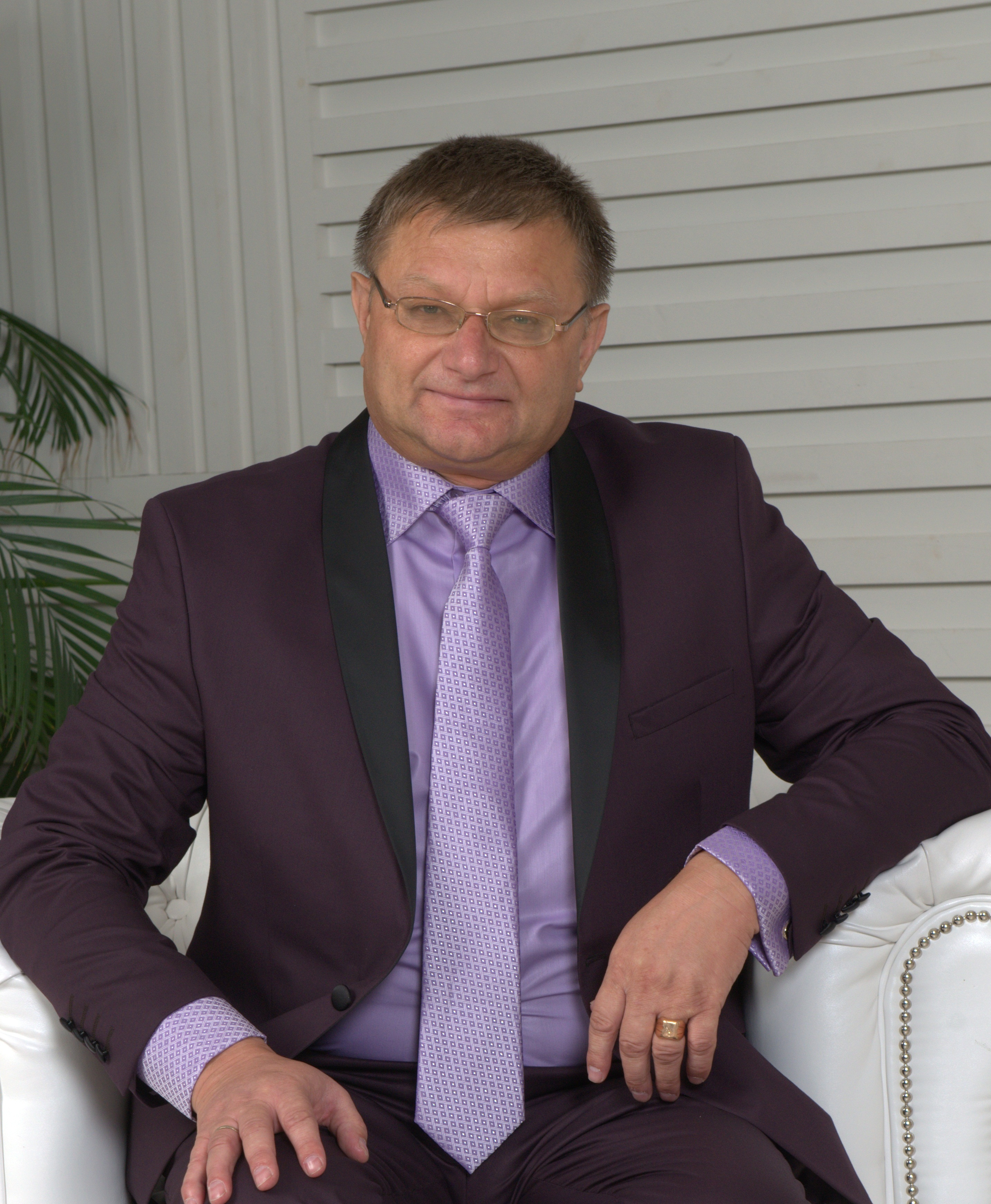 Заслужений артист України